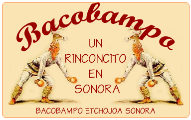 Transmite Noticias Radio y Television Online desde Bacobampo Etchojoa Sonora